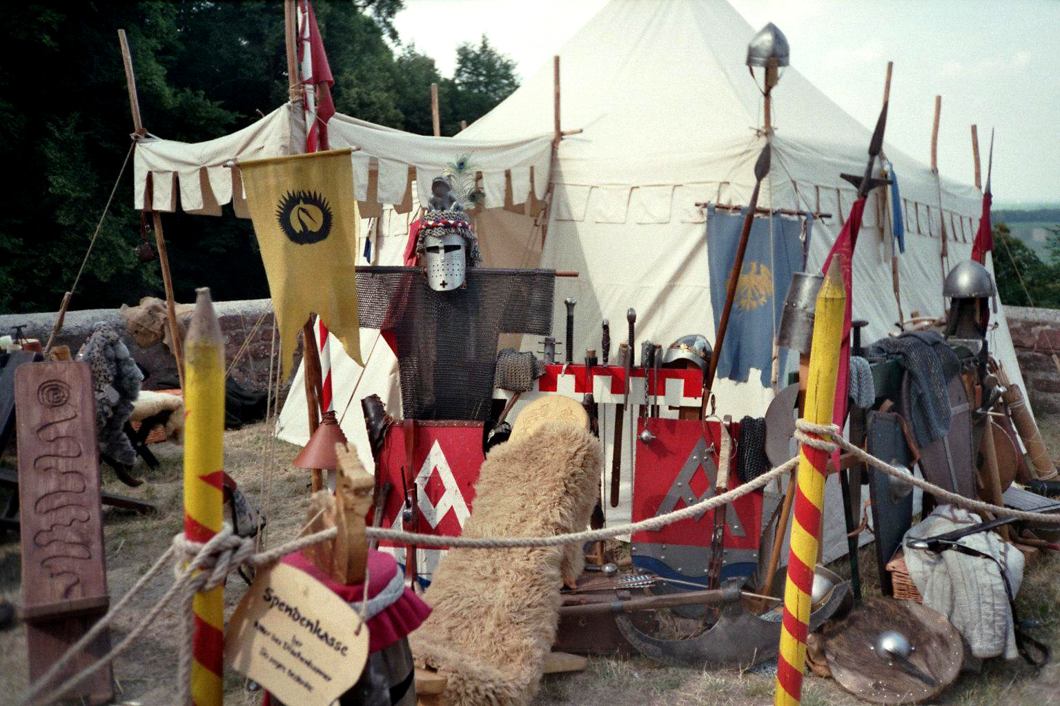 Das Landeckfest - ein Mittelaltermarkt, der in unregelmäßigen Abständen auf der Burgruine Landeck bei Klingenmünster/Rheinlandpfalz stattfindet.